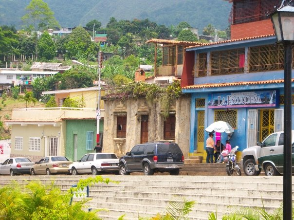 Betijoque, estado Trujillo - Venezuela